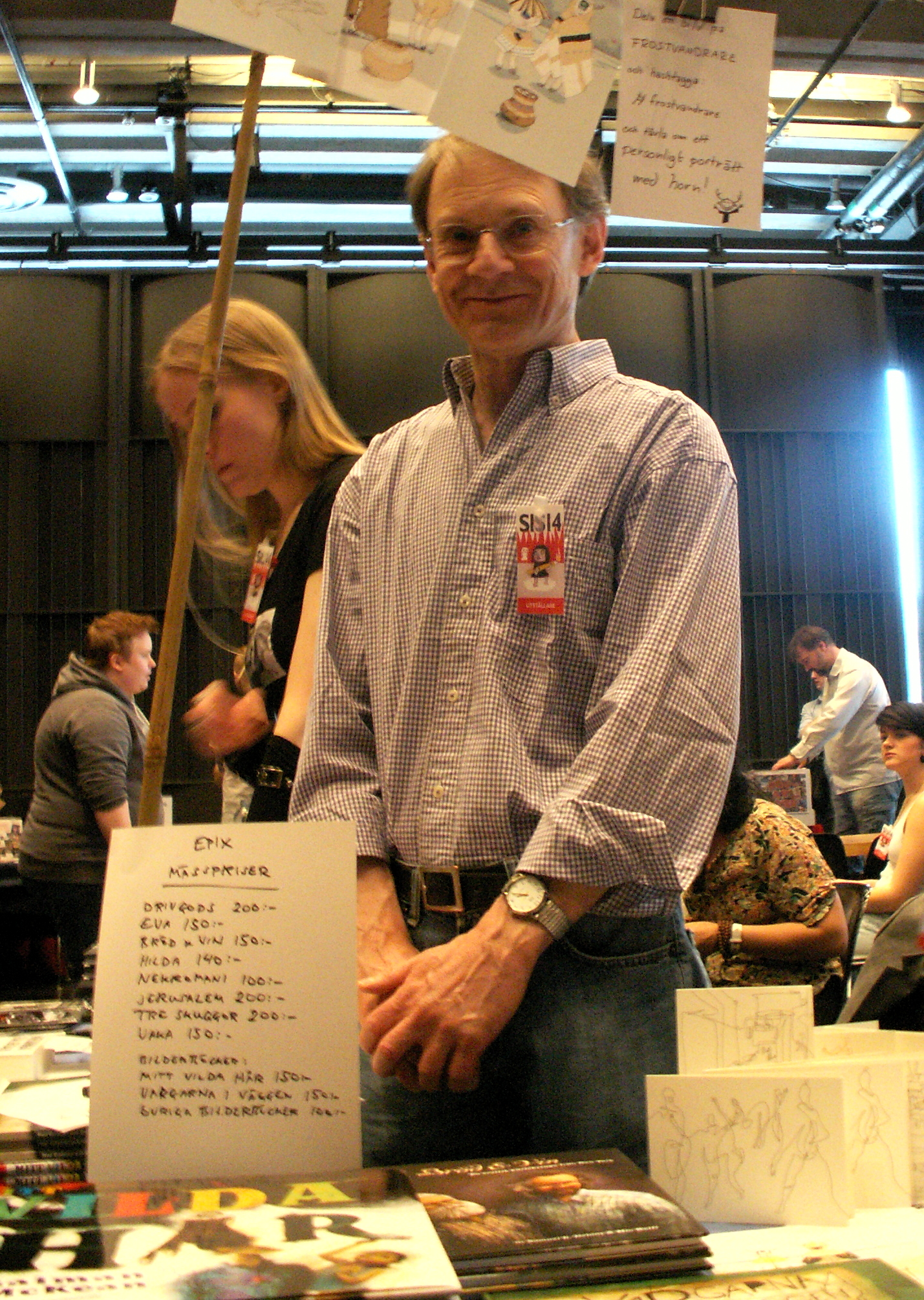 Göran Ribe vid Epix förlagsbord på SIS 2014.